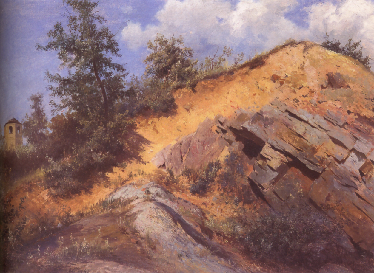 Alois Kirnig: Granitsteinbruch, 1868, Öl auf Karton, 34 x 50 cm (Sammlung Kooperativa)